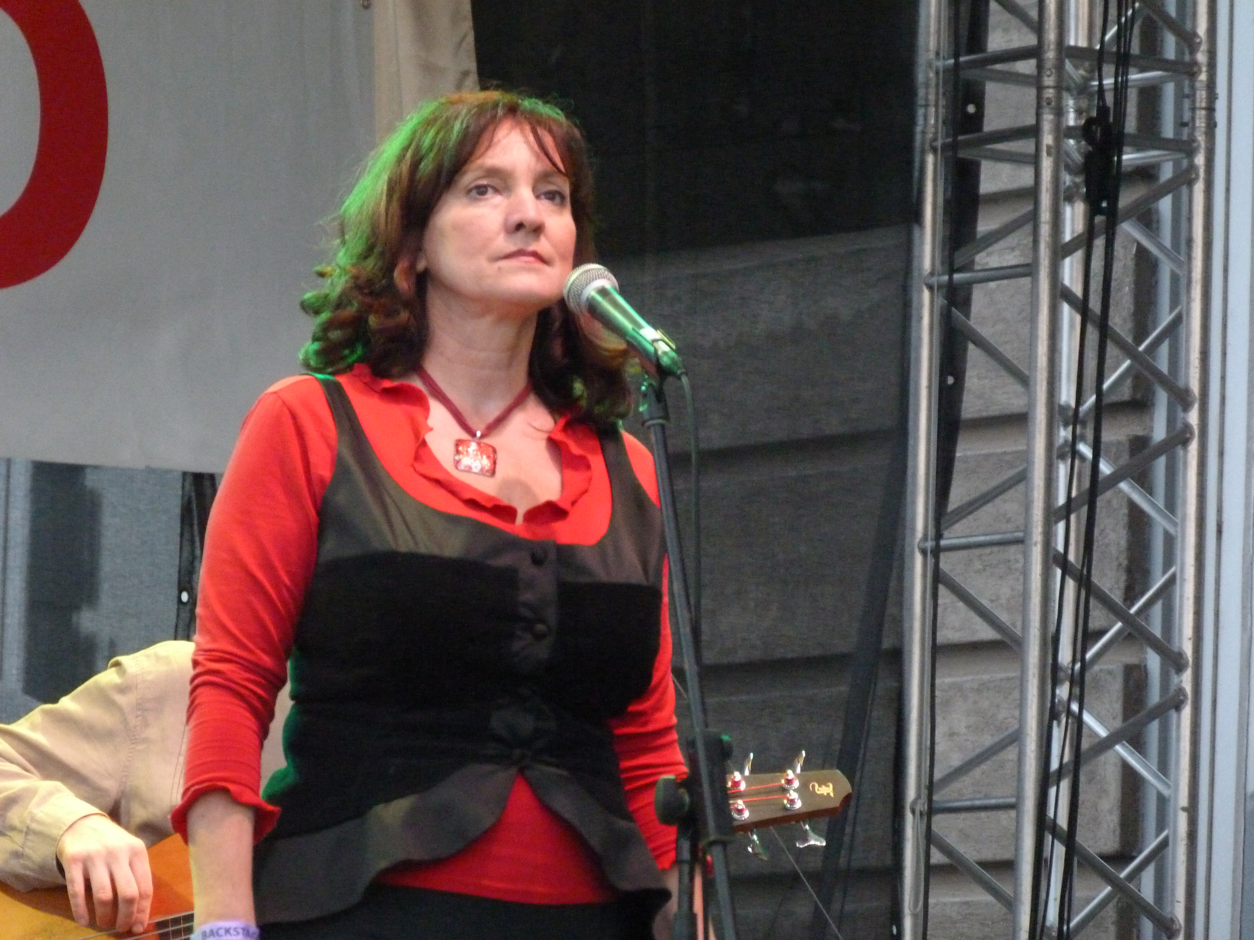 A felvétel 2014. szeptember 12-én, pénteken készült Budapesten, a 23. Budavári Borfesztiválon. Nagyszínpad, a Makám együttes és vendégei. Az együttes tagjai: Krulik Zoltán - gitár Korzenszky Klára - ének Kuczera Barbara – hegedű, vokál Boros Attila - basszusgitár Eredics Dávid - fúvós hangszerek Keönch László - ütőhangszerek Mohai György - hangmérnök ( Szalóki Ágnes, Lovász Irén. Bognár Szilvia: Katona sirató KATONA SIRATÓ MAKÁM BOGNÁR SZILVIA MIHI 2014 Források Bor és Pia borpiaci szakmai magazin 2014. augusztus Borfesztivál Melléklet 23. Budavári Borfesztivál kiállítási tájékoztató ©© Derzsi Elekes Andor, Budapest, 2014, A kép és filmfelvételek egészben, vagy részletekben másolását, bármilyen úton történő sokszorosítását és felhasználását a szerző ellenérték nélkül, jogutódjaira is kihatóan megengedi. Az engedély kiterjed a kereskedelmi célú hasznosításra is. Kéri azonban nevének feltüntetését a felhasználás során. A Metapolisz sorozat valamennyi képe és filmje Creative Commons alatti valamint kereskedelmi - for profit - célra is felhasználható. Ajánlott hivatkozás: Derzsi Elekes Andor: Metapolisz DVD line